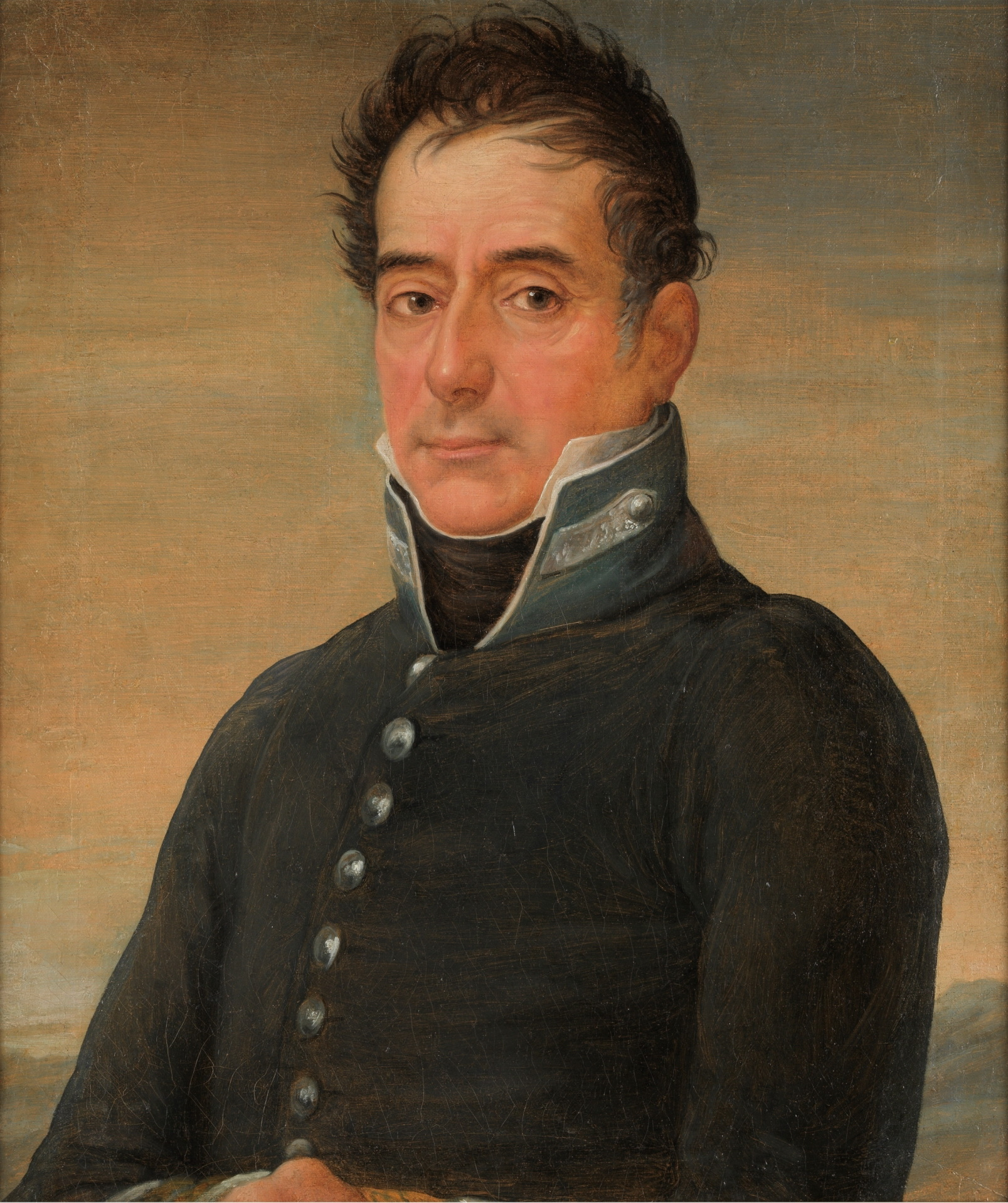 Retrato del militar y político español Francisco Copons y Navia (1764-1842), conde de Tarifa.